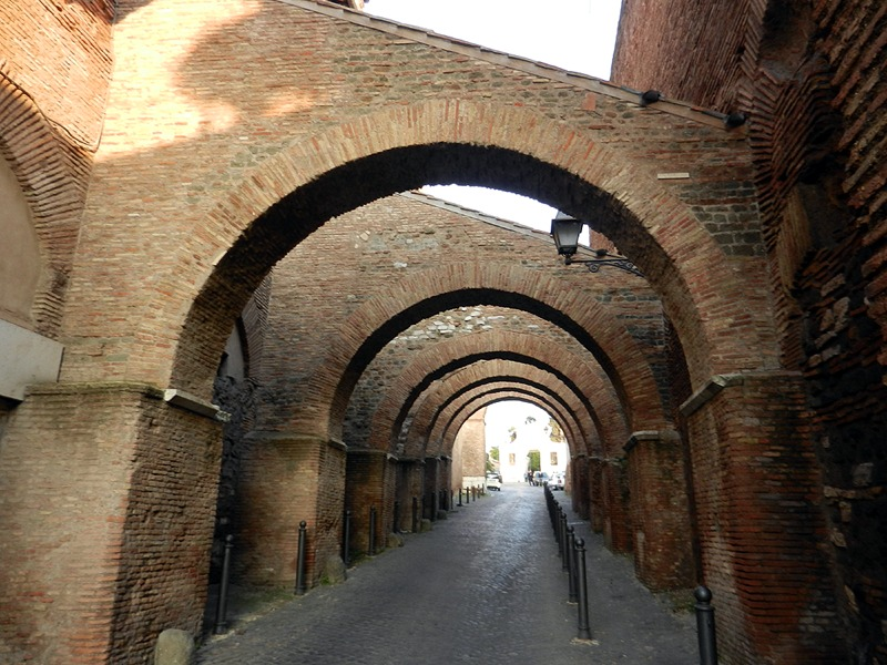 Roma - Clivio di Scauro